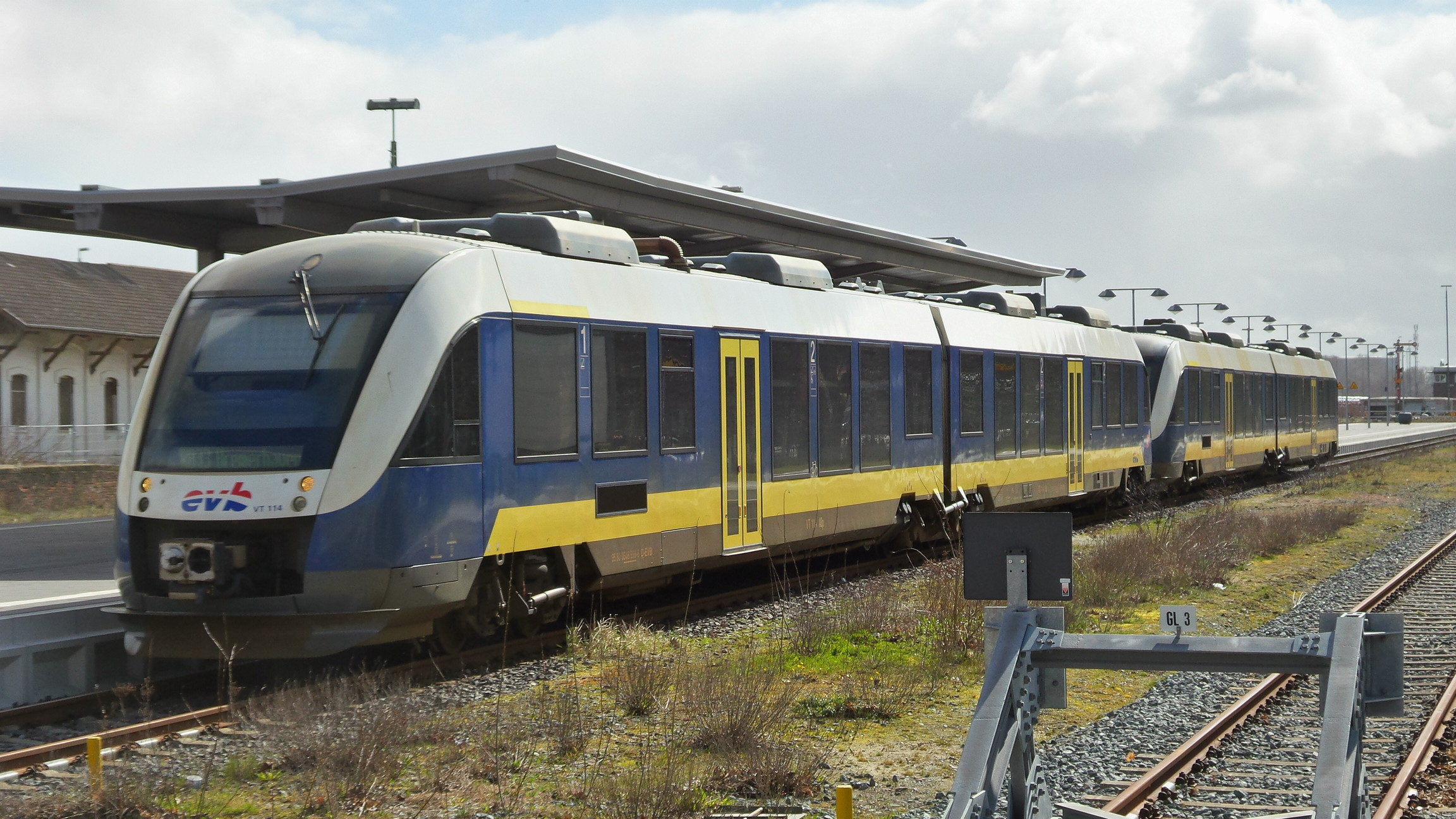 Alstom Coradia LINT der evb aus dem Fahrzeugpool der Landesnahverkehrsgesellschaft Niedersachsen im Bahnhof Cuxhaven